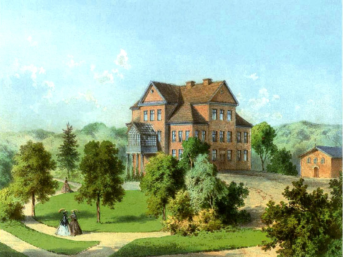 Rittergut Seubersdorf, Kreis Marienwerder